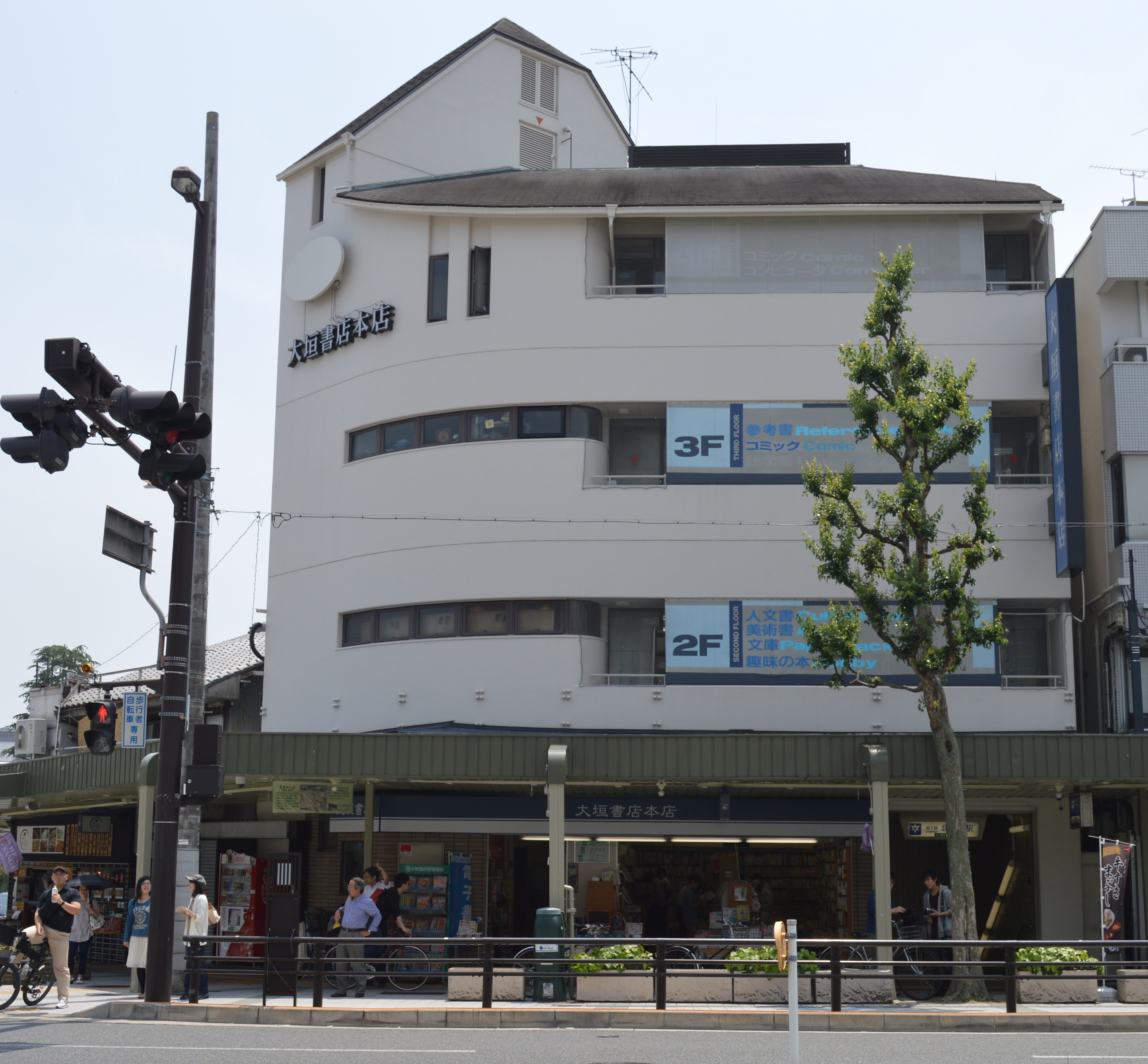 京都市北区小山 烏丸北大路交差点南西角にある大垣書店本店 北大路通を挟んで撮影